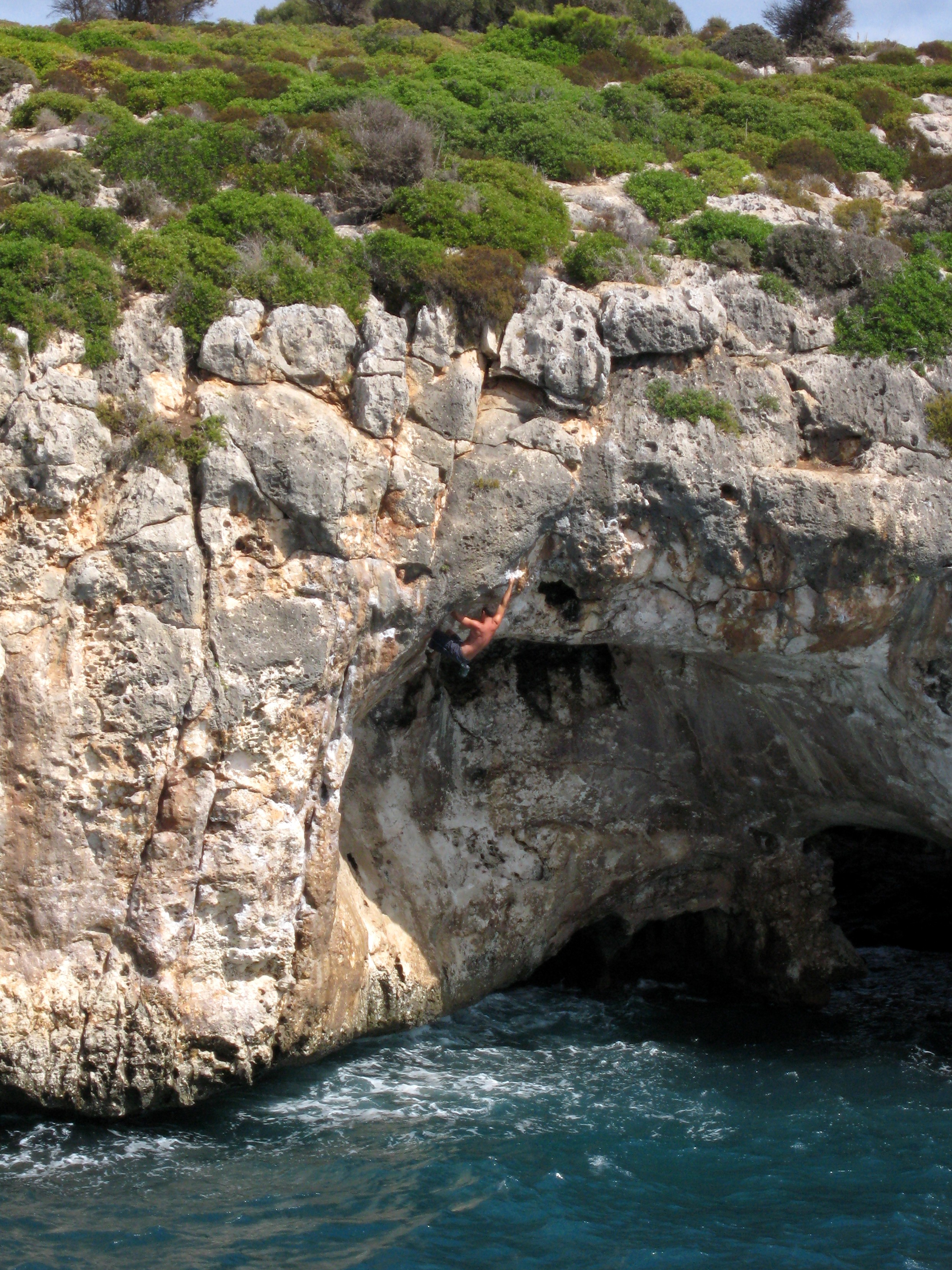 Freiklettern (Psicobloc / Deep Water Soloing) an der Steilküste der Caló Blanc, Nebenbucht der Cala Varques, Gemeinde Manacor, Mallorca, Spanien